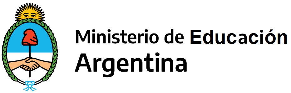 Ministerio de Educación